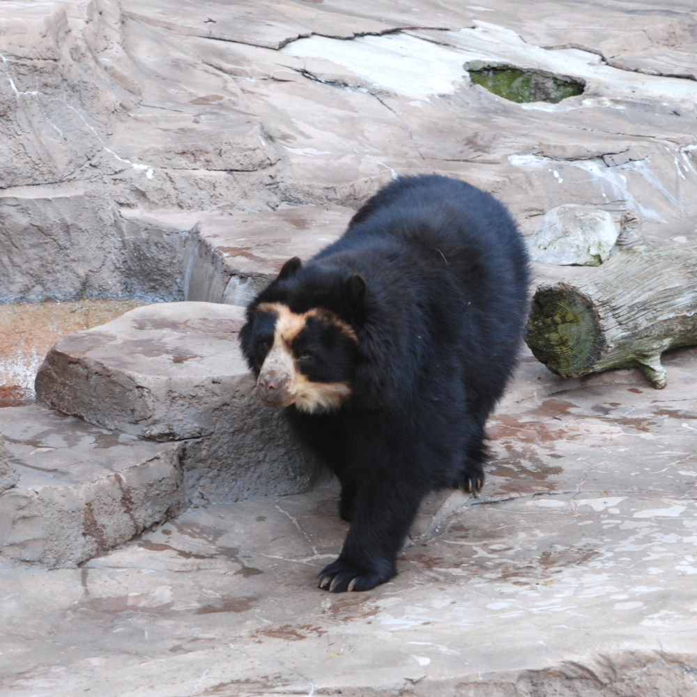 天王寺動物園のメガネグマ。